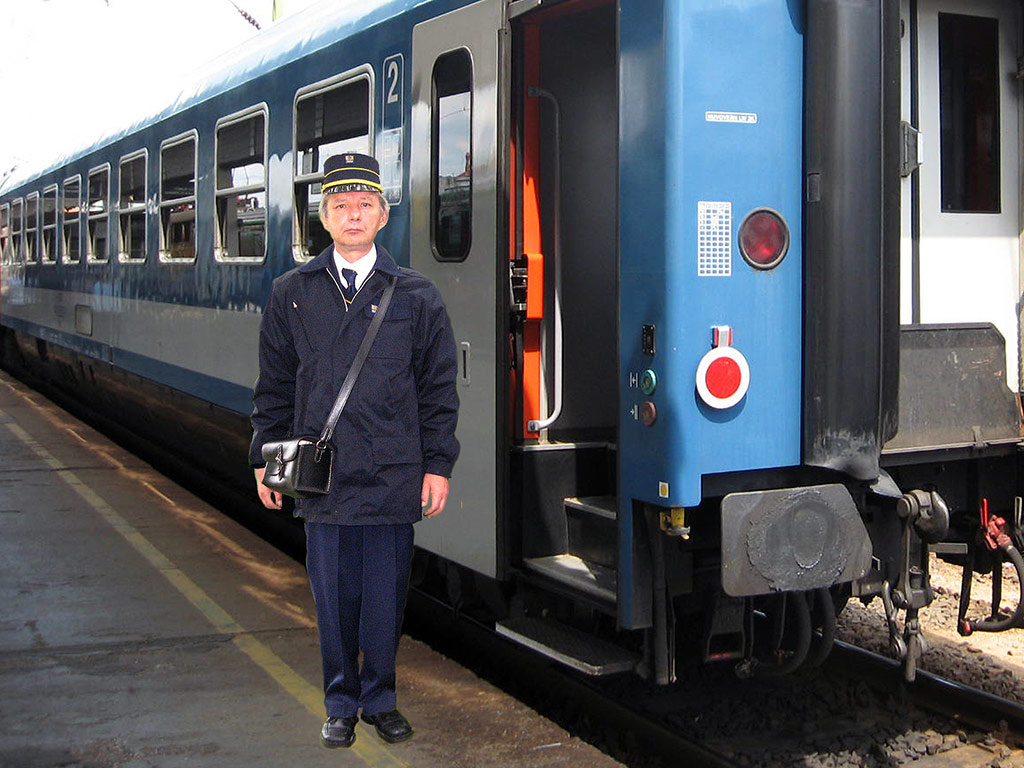 Jegyvízsgáló szolgálatban